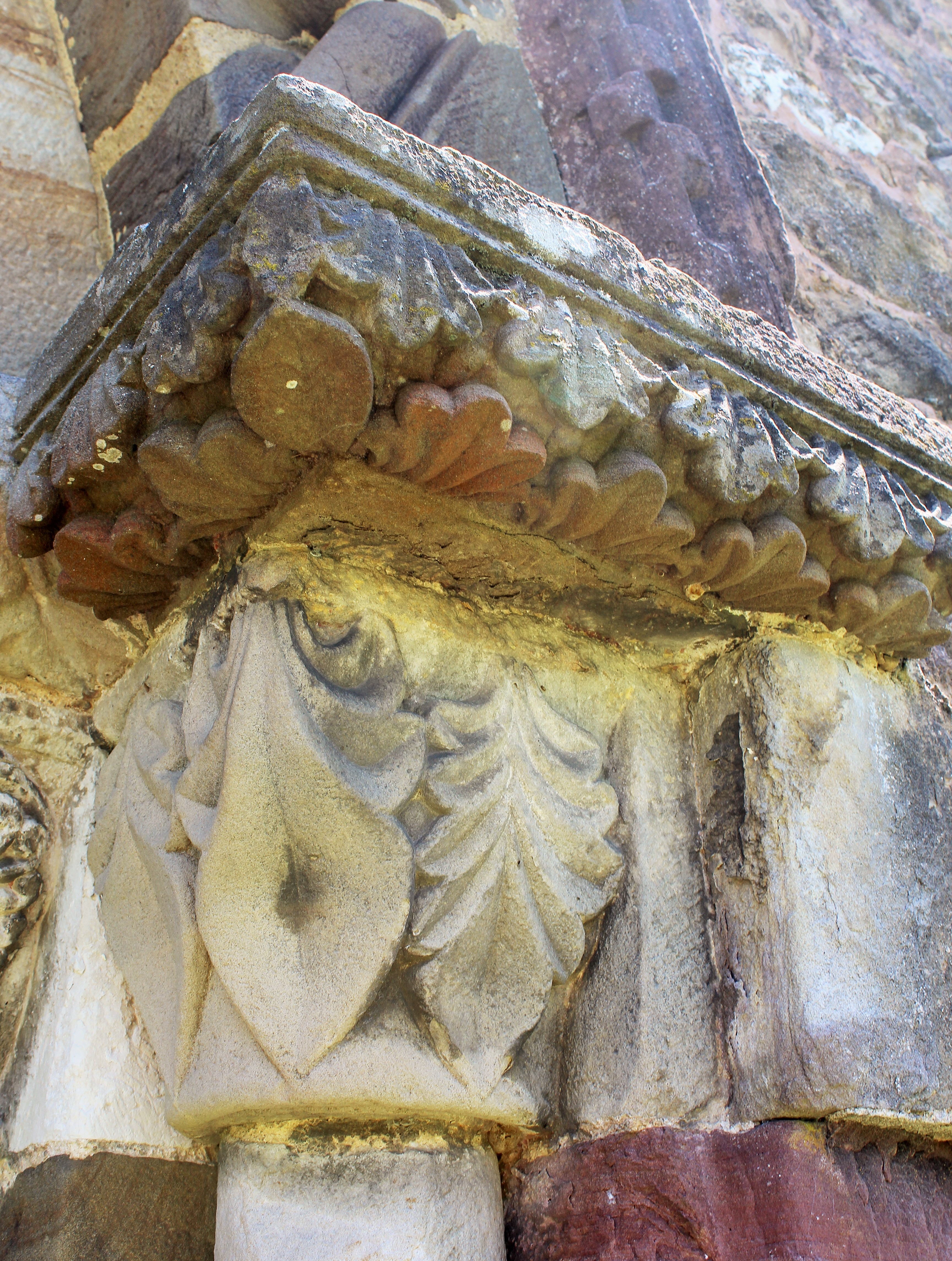 Capitel del pórtico principal, zona derecha exterior